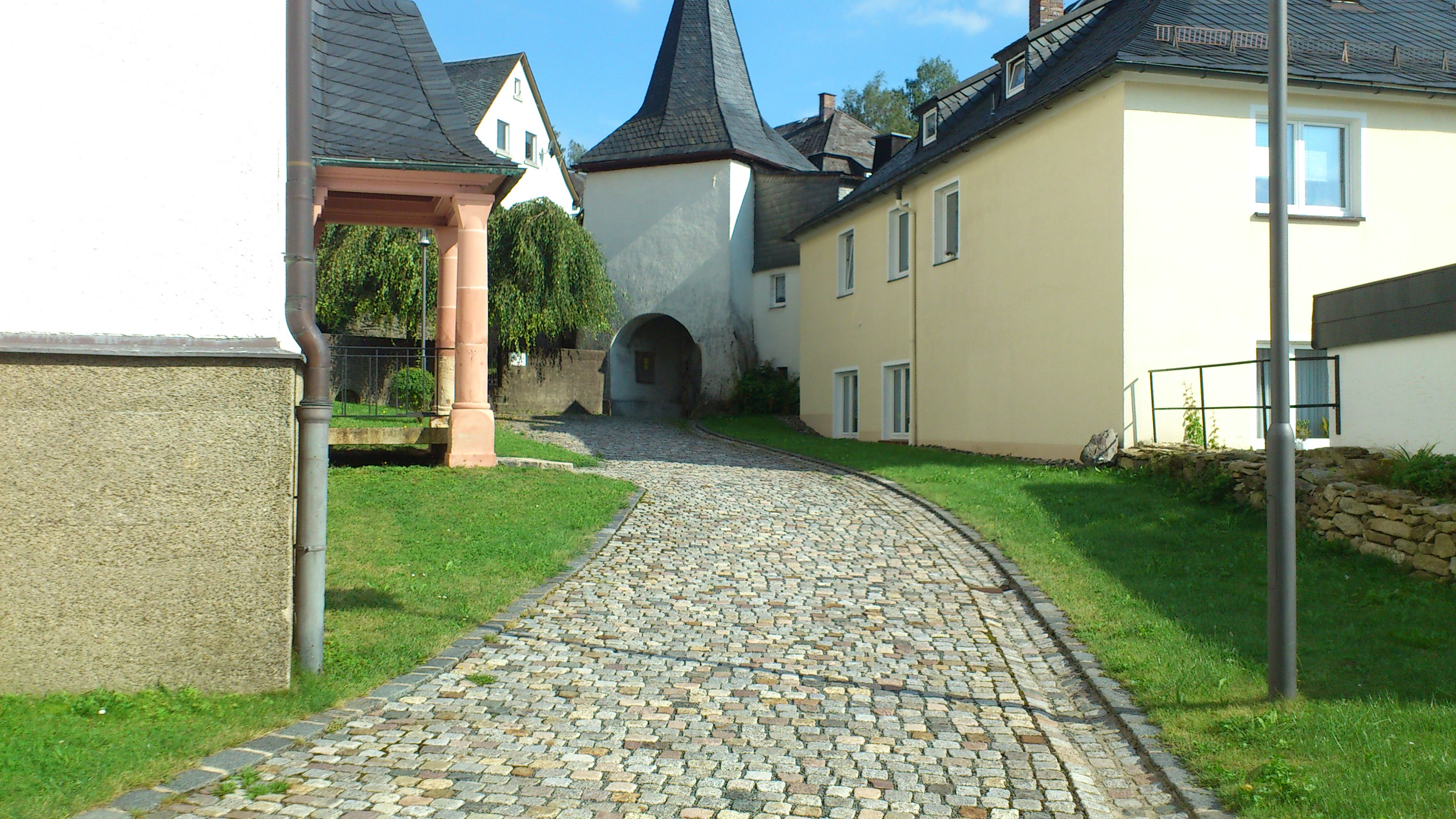 Torturm zum Markt von innen